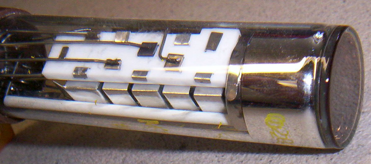 Fotovervielfacher